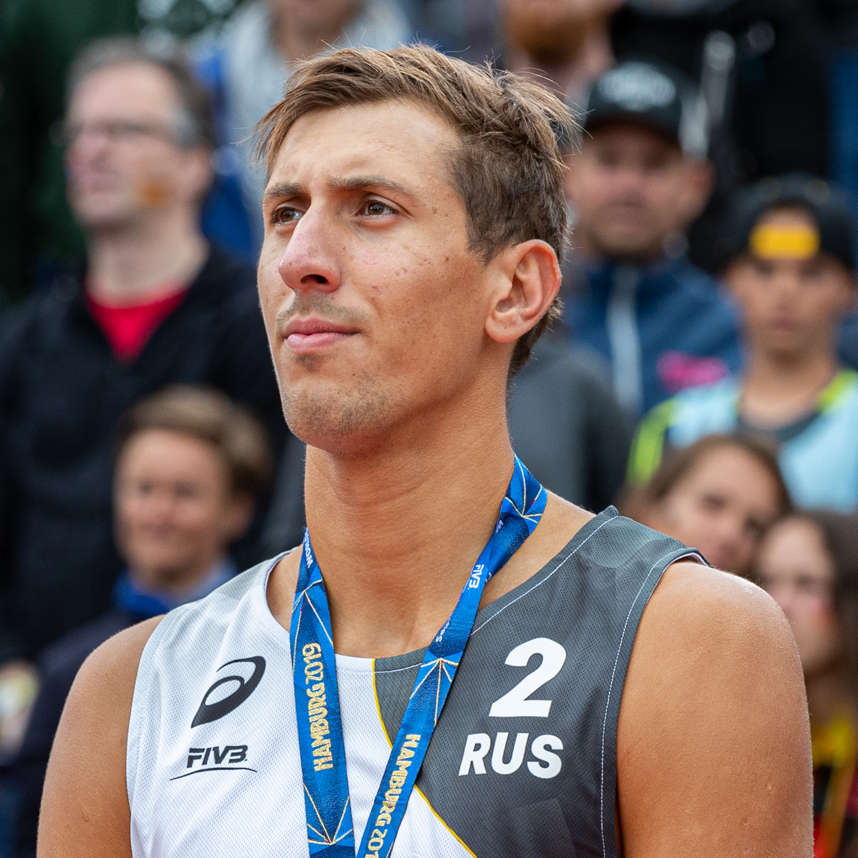 BeachVolleyball Weltmeisterschaft Hamburg 2019; Oleg Stoyanovskiy (RUS, Russland); Porträt, Einzelbild